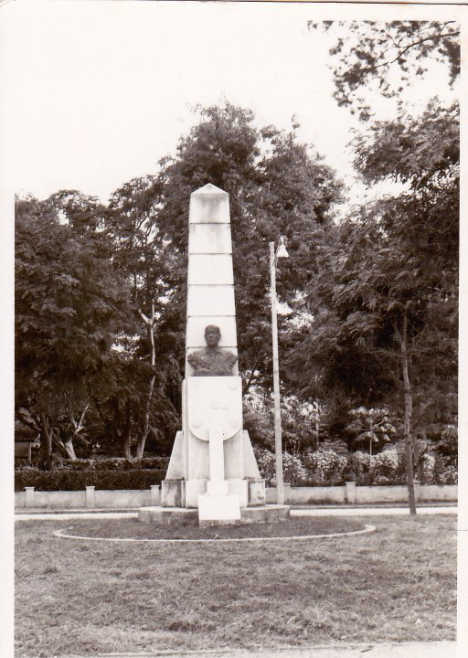 Monumento ao Engenheiro Canto Resende-Abril de 1970